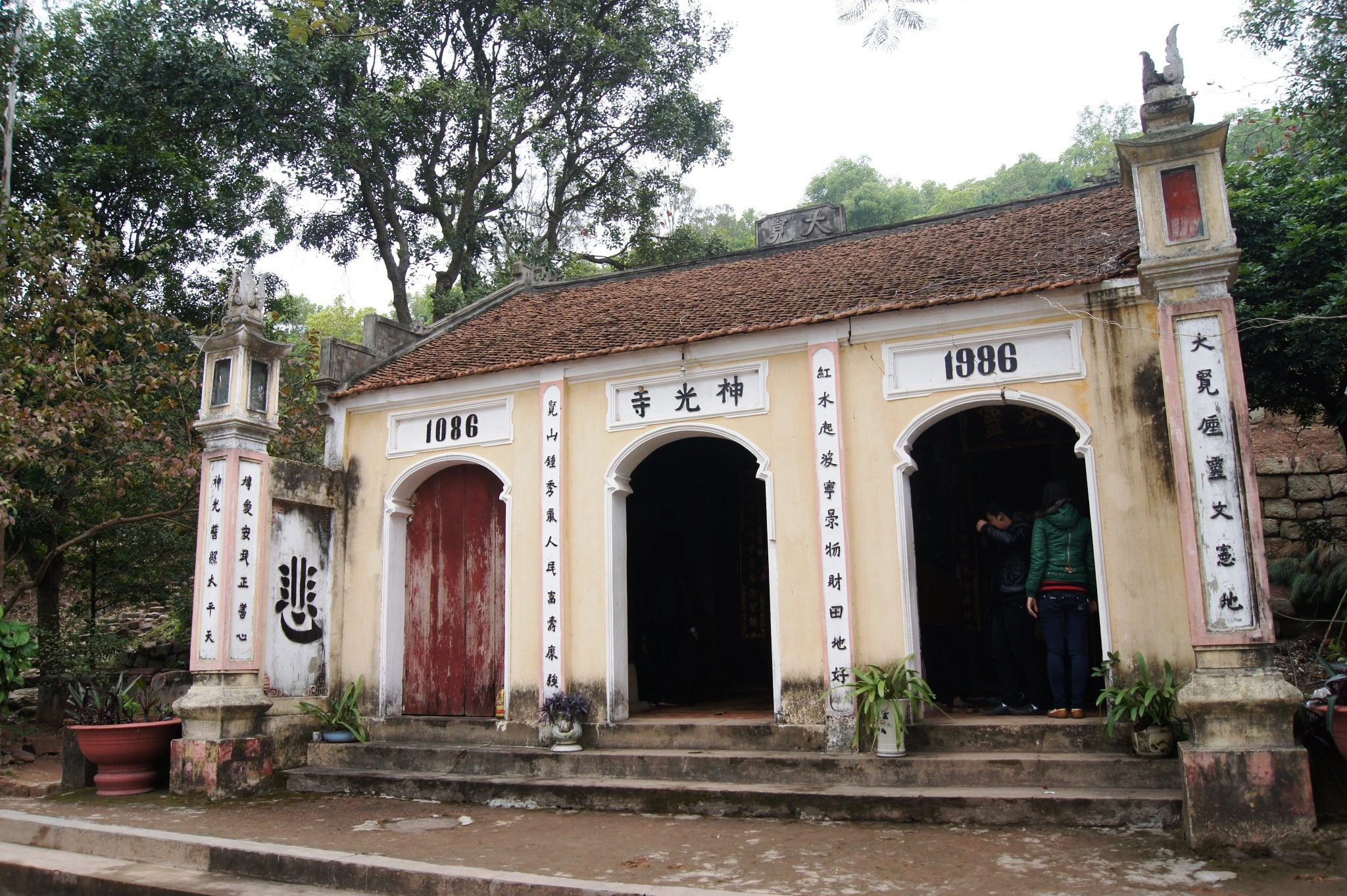 Chùa Dạm hiện nay (2012) chỉ còn là 1 ngôi chùa nhỏ bé ở bậc cấp thứ 2.